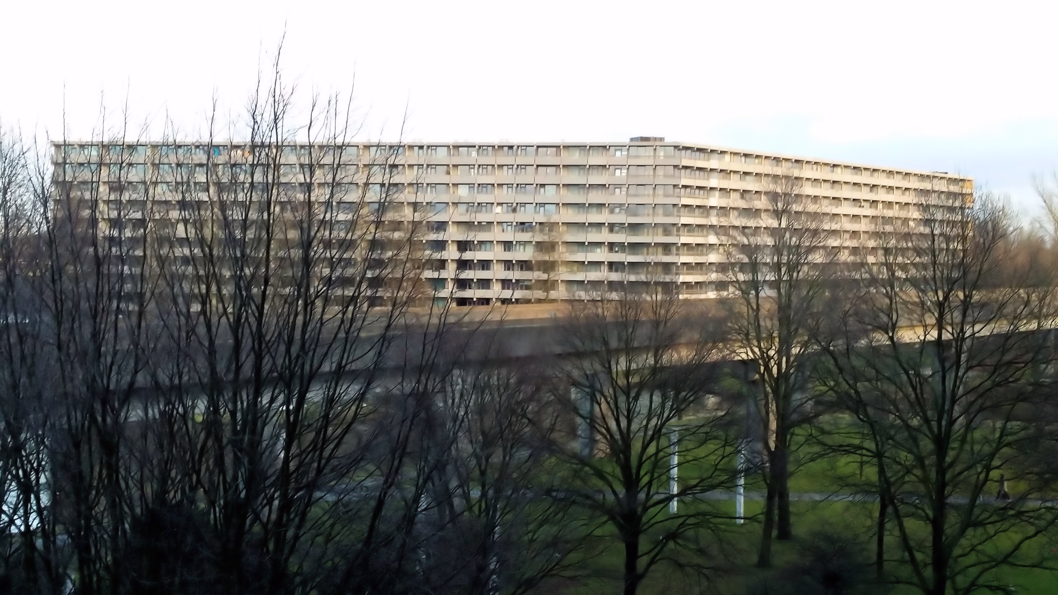 Honingraatflat Kleiburg in de winter van 2015, vanaf Groeneveen.